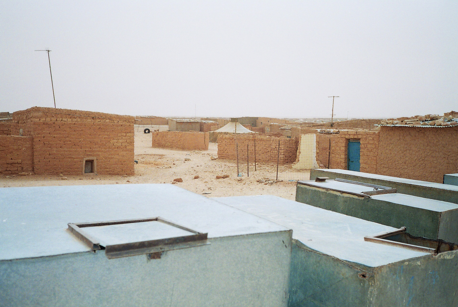 Wilaya de Smara, en los campamentos de refugiados saharauis de Tinduf.